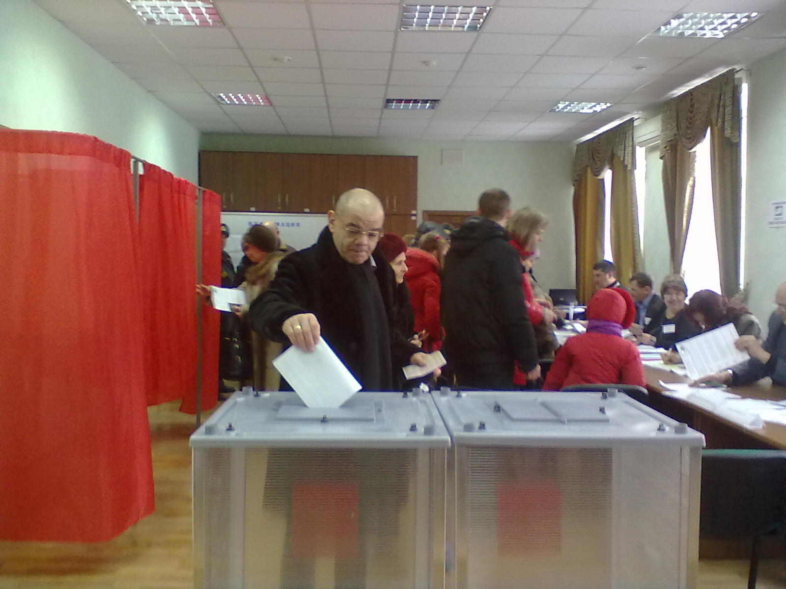 Константин Райкин голосует на избирательном участке № 0311 г. Волгограда по открепительному удостоверению на выборах Президента России 4 марта 2012 года.